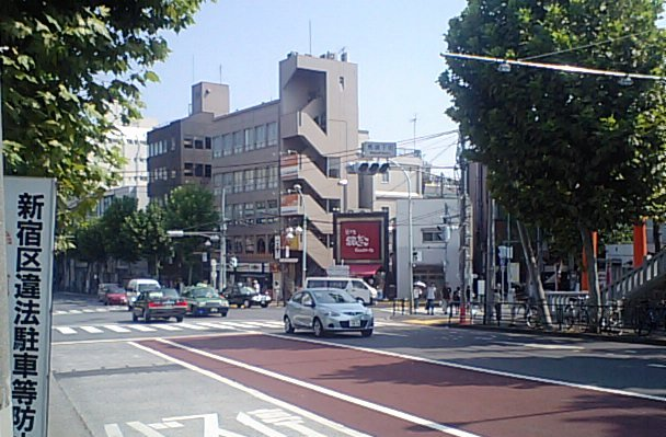 新宿区馬場下町交差点（旧・穴八幡交差点）。